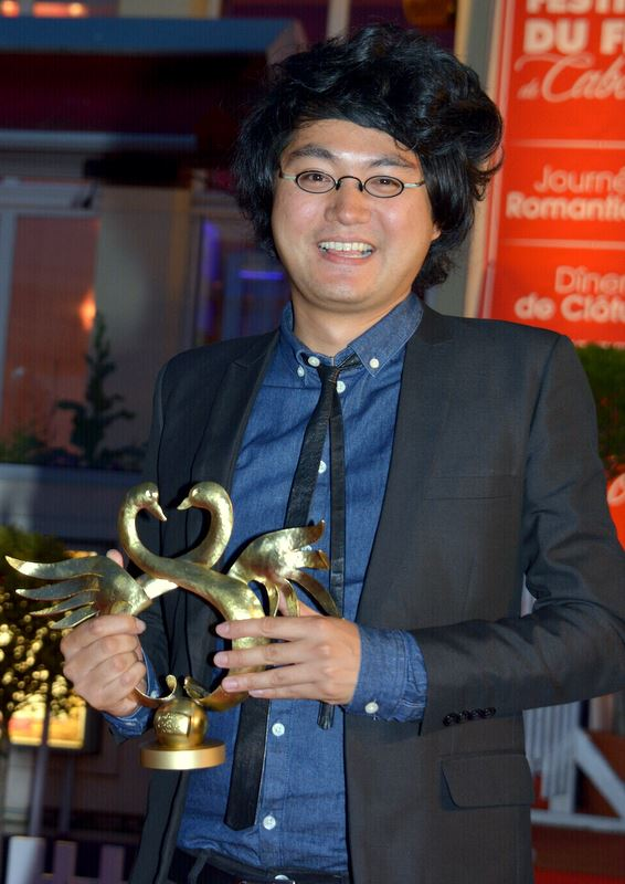 Davy Chou au festival de Cabourg